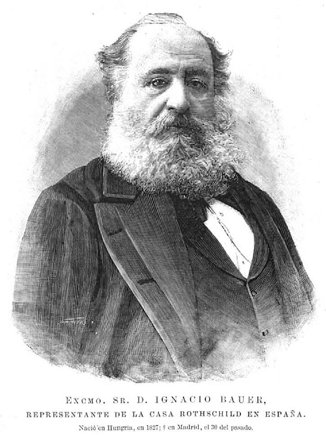 Ignacio Bauer, representante de la casa Rothschild en España, nació en Hungría en 1827, falleció en Madrid, el 30 del pasado, en la revista española La Ilustración Española y Americana.